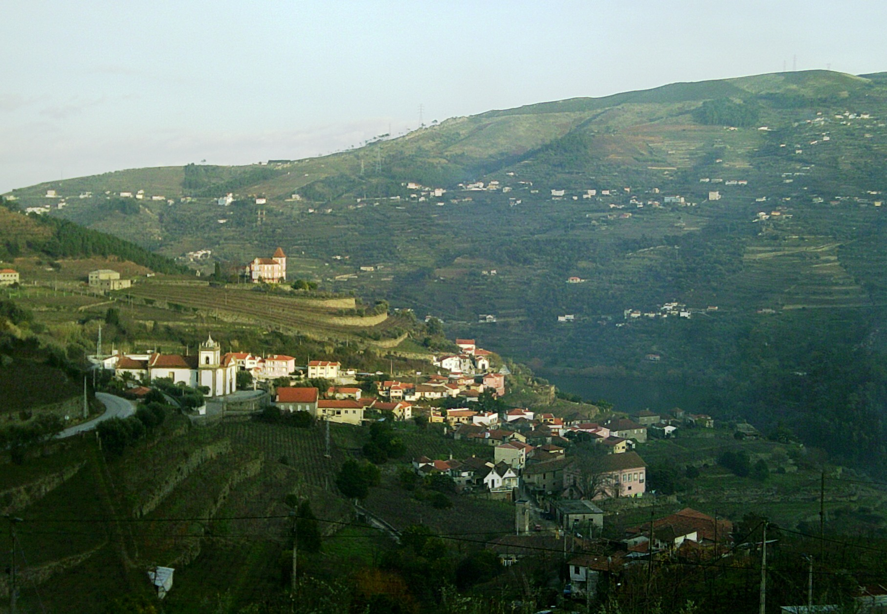 Freguesia de Barqueiros, Concelho de Mesão Frio, Distrito de Vila Real, Portugal: vista panorâmica da povoação.